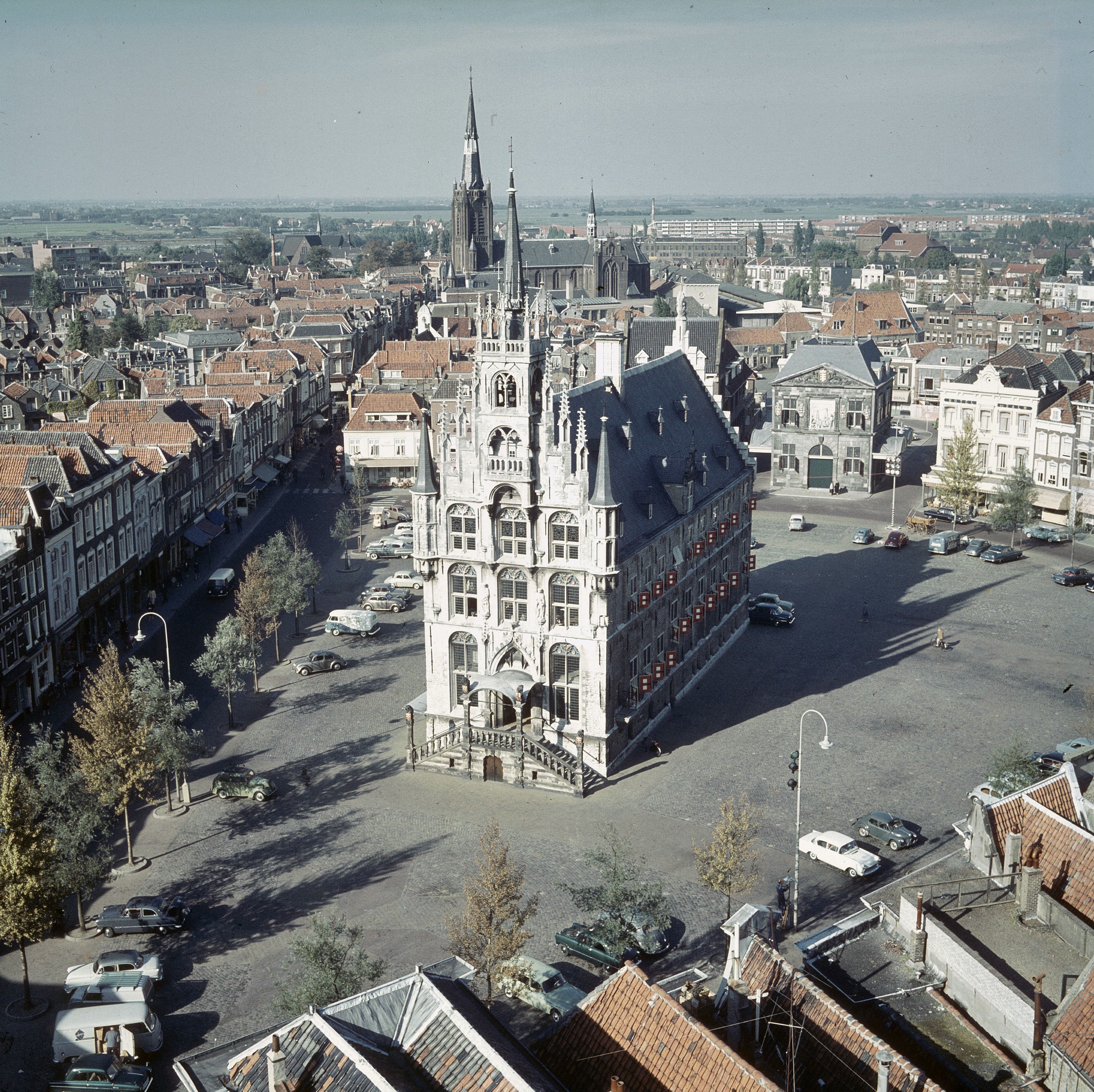 Stadhuis: Overzicht van de voorgevel en de rechter zijgevel en omgeving, gezien vanaf de toren van de Sint-Janskerk